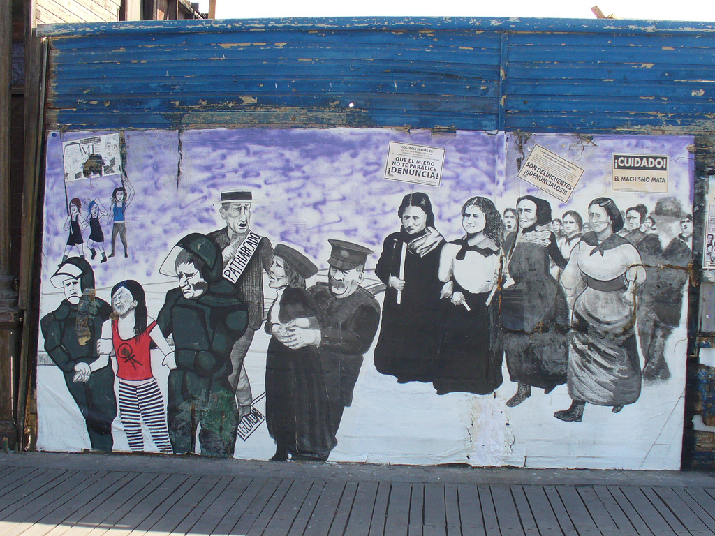 Mural que hace alusión a la violencia machista